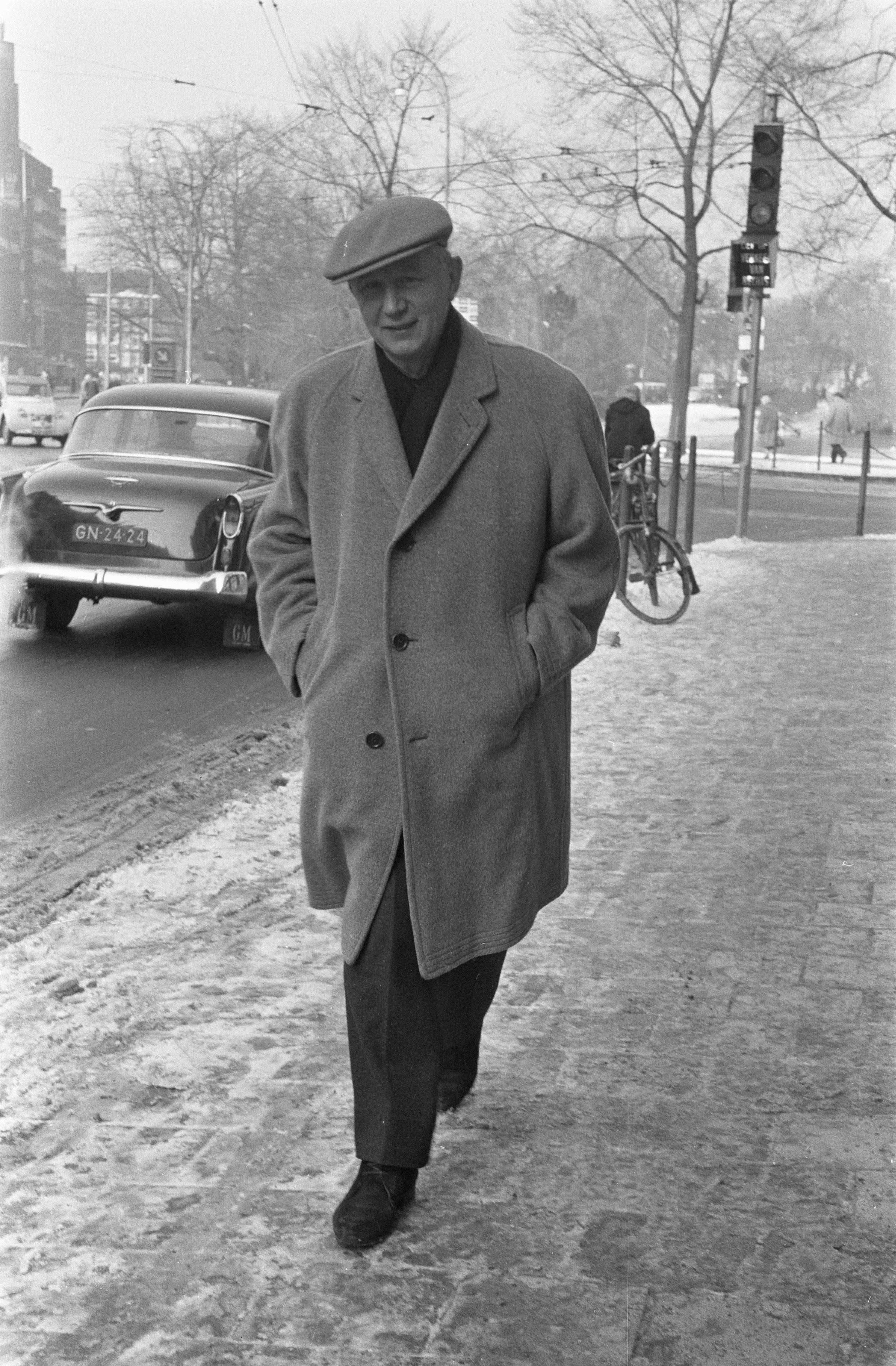 Collectie / Archief : Fotocollectie Anefo Reportage / Serie : [ onbekend ] Beschrijving : Filmregisseur Helmut Kautner in Nederland Datum : 15 januari 1960 Trefwoorden : filmregisseurs Persoonsnaam : Helmut Kautner Instellingsnaam : Nederland Fotograaf : Pot, Harry / Anefo Auteursrechthebbende : Nationaal Archief Materiaalsoort : Negatief (zwart/wit) Nummer archiefinventaris : bekijk toegang 2.24.01.05 Bestanddeelnummer : 910-9501